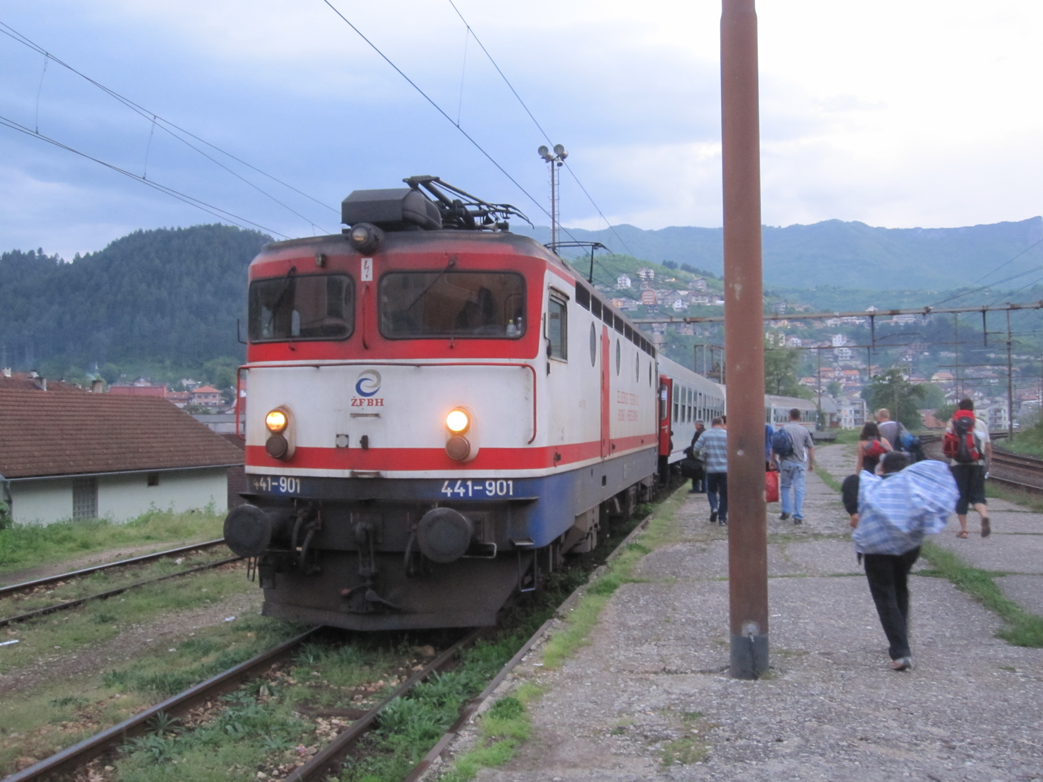 11.05.11 Konjic ŽFBH 441.901